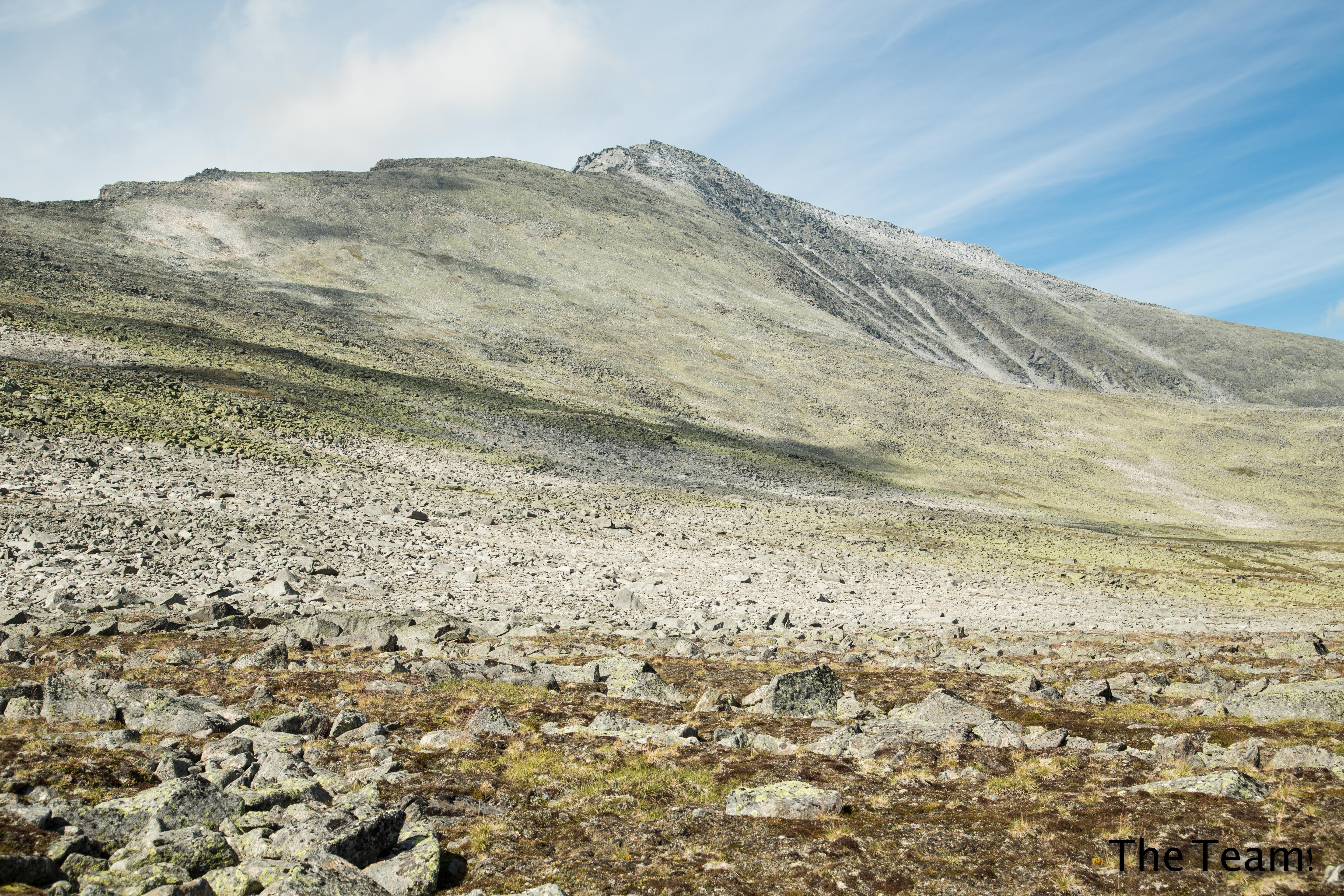 Face sud du Narodnaïa